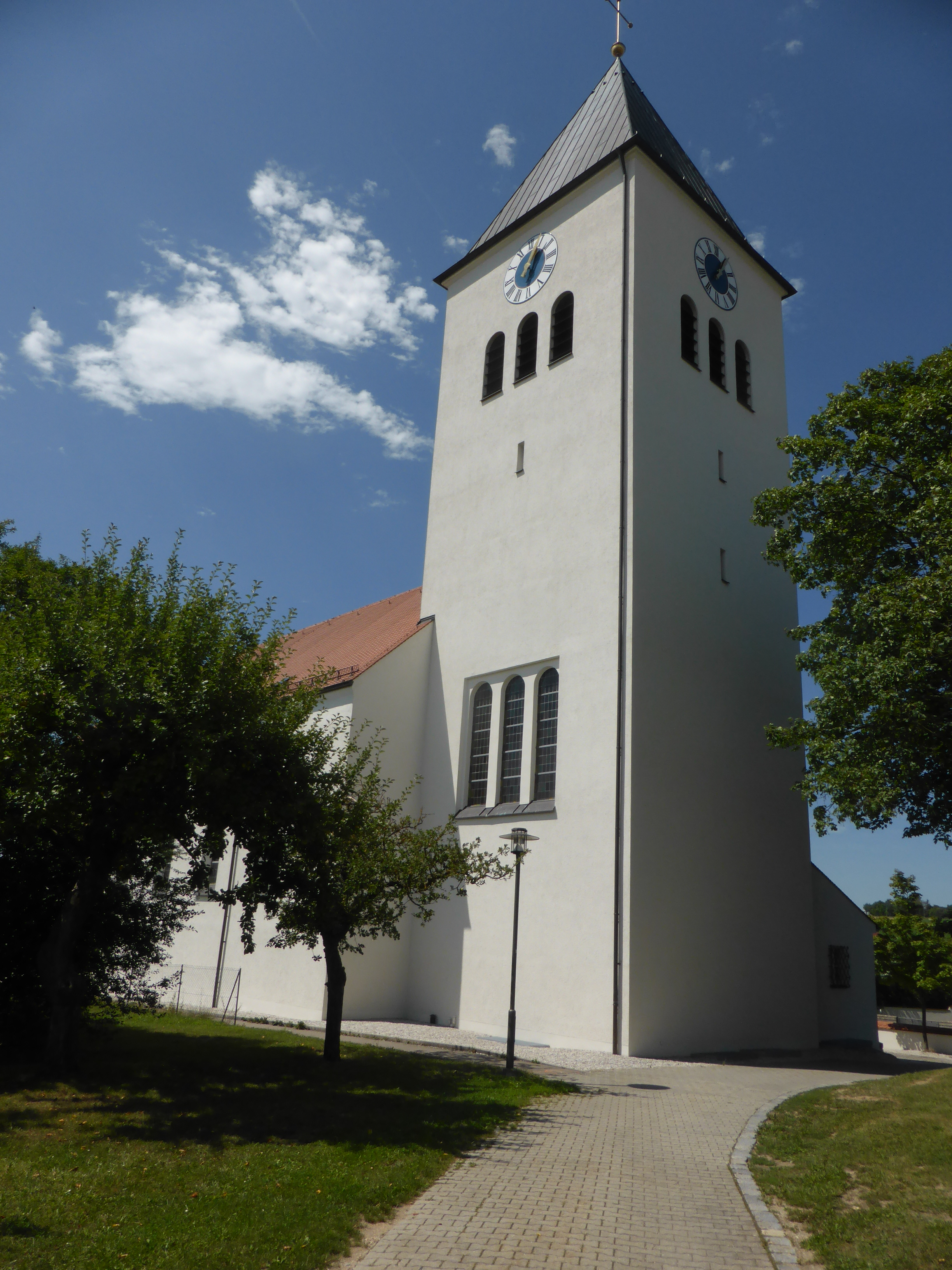 Pfarrkuratiekirche St. Michael (Eitlbrunn)